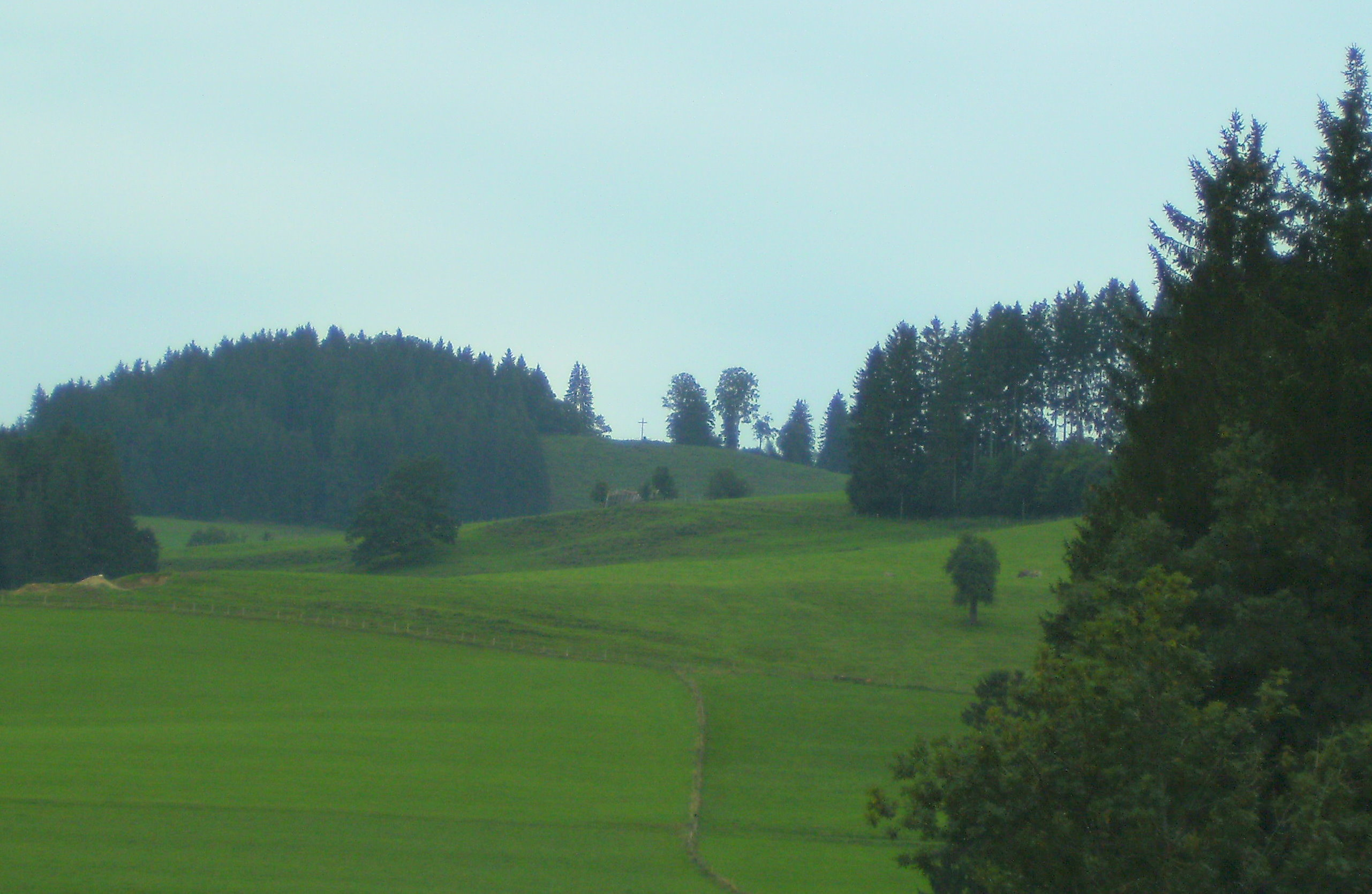 Iberg (Allgäu)